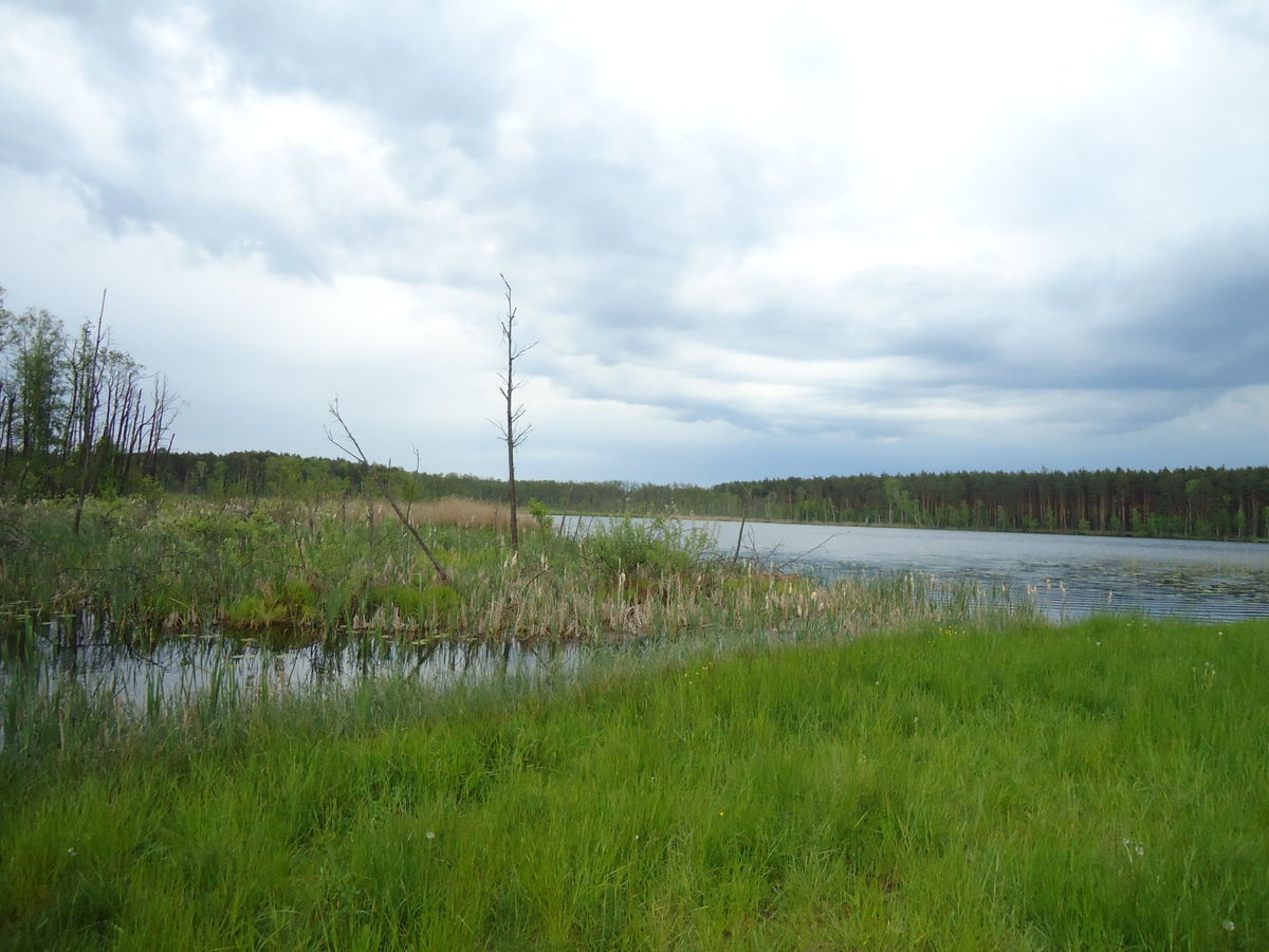 Jezioro perespa w rezerwacie Żółwiowe Błota